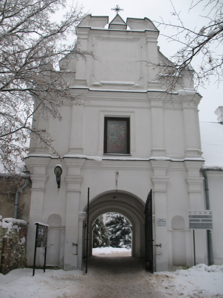 Chełm. Brama Uściłuska (1616) w zespole katedry greckokatolickiej „Górka Katedralna”